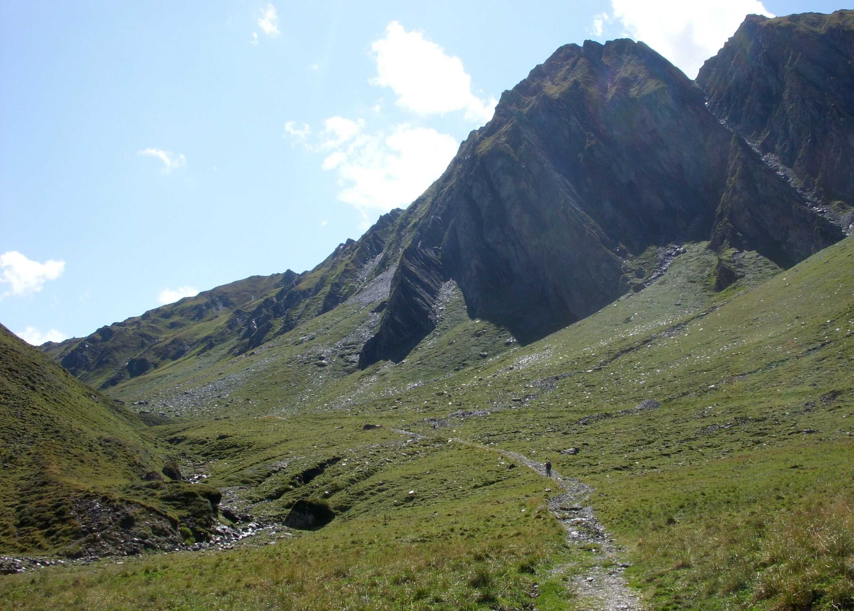 Das Tuxer Joch gesehen vom Weitental i Richtung Süden